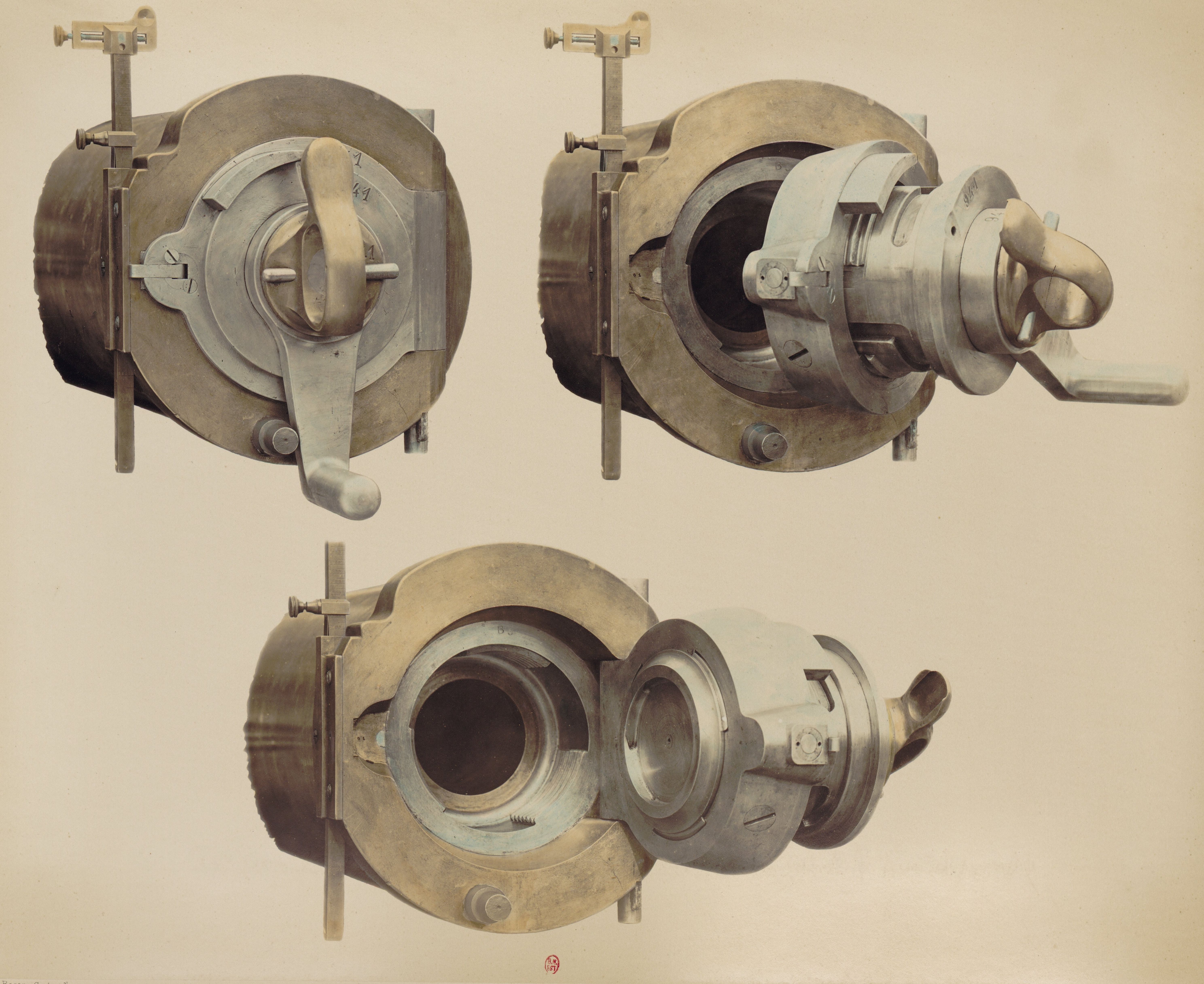 Matériel de l'artillerie et des équipages militaires : culasse du canon de 7, rayé, de campagne.